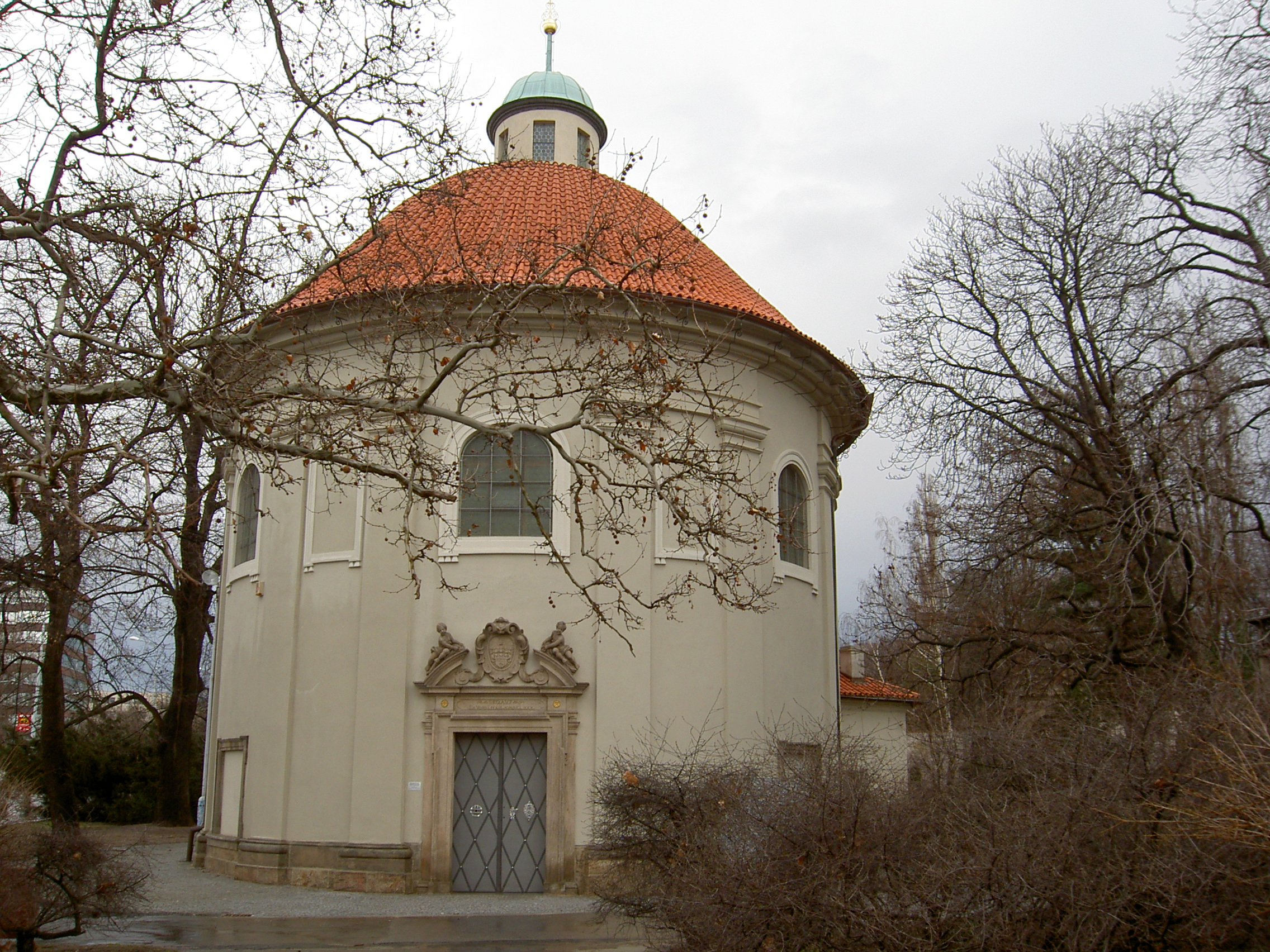 Kostel svatého Rocha na Žižkově